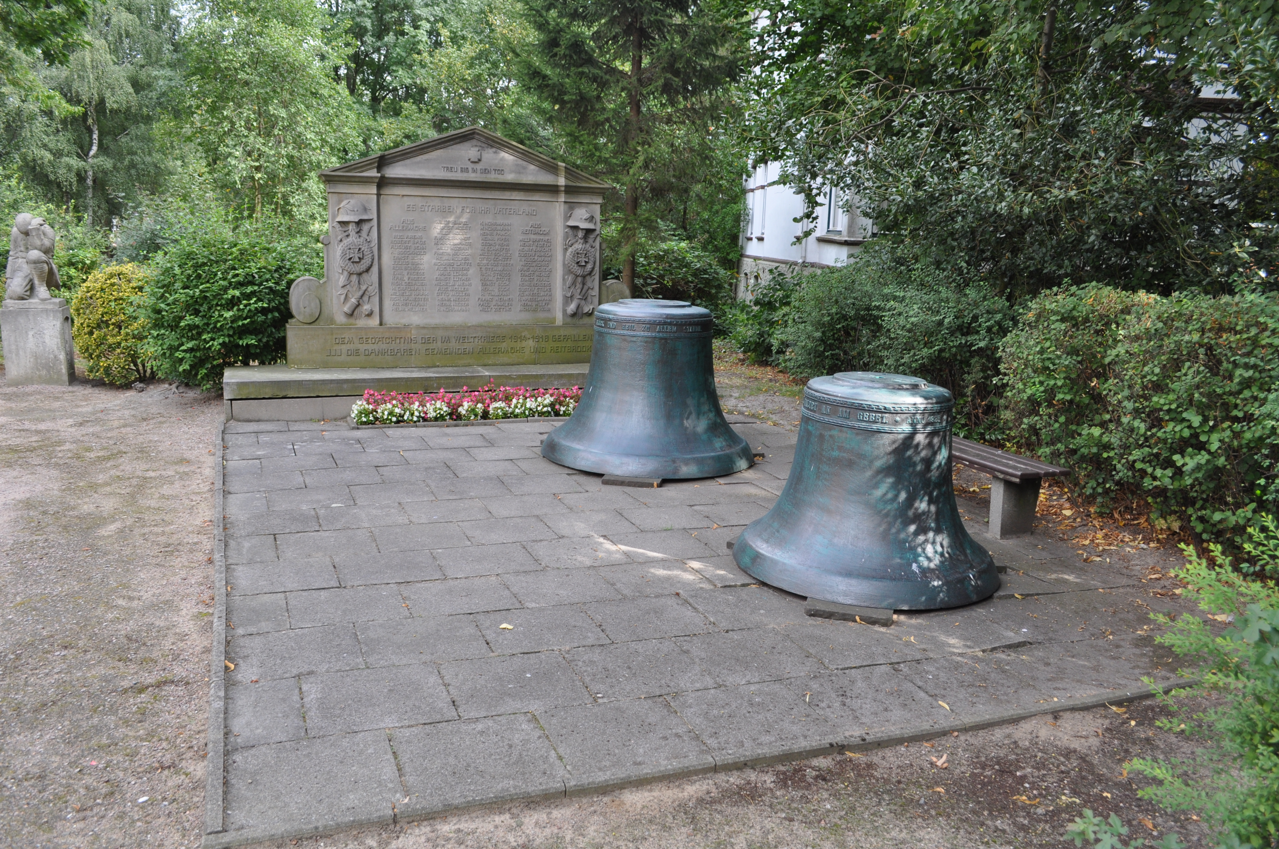 Kriegerdenkmal 1914-18 auf dem Kirchhof der Dreieinigkeitskirche in Hamburg-Allermöhe im Sommer 2012. This is a photograph of an architectural monument.